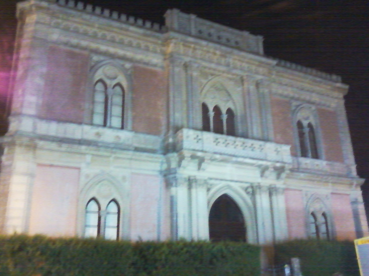 una villa a carpignano